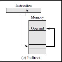 Adresimi Indirekt